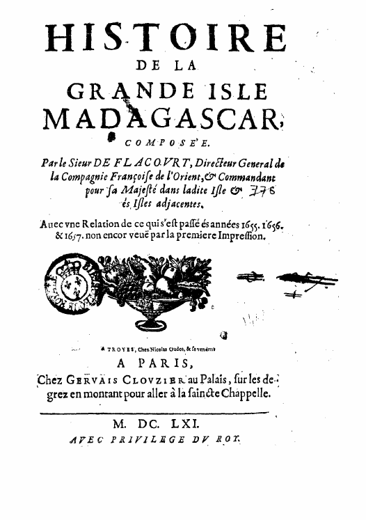 Première page de l'Histoire de la Grande Isle Madagascar par Étienne de Flacourt